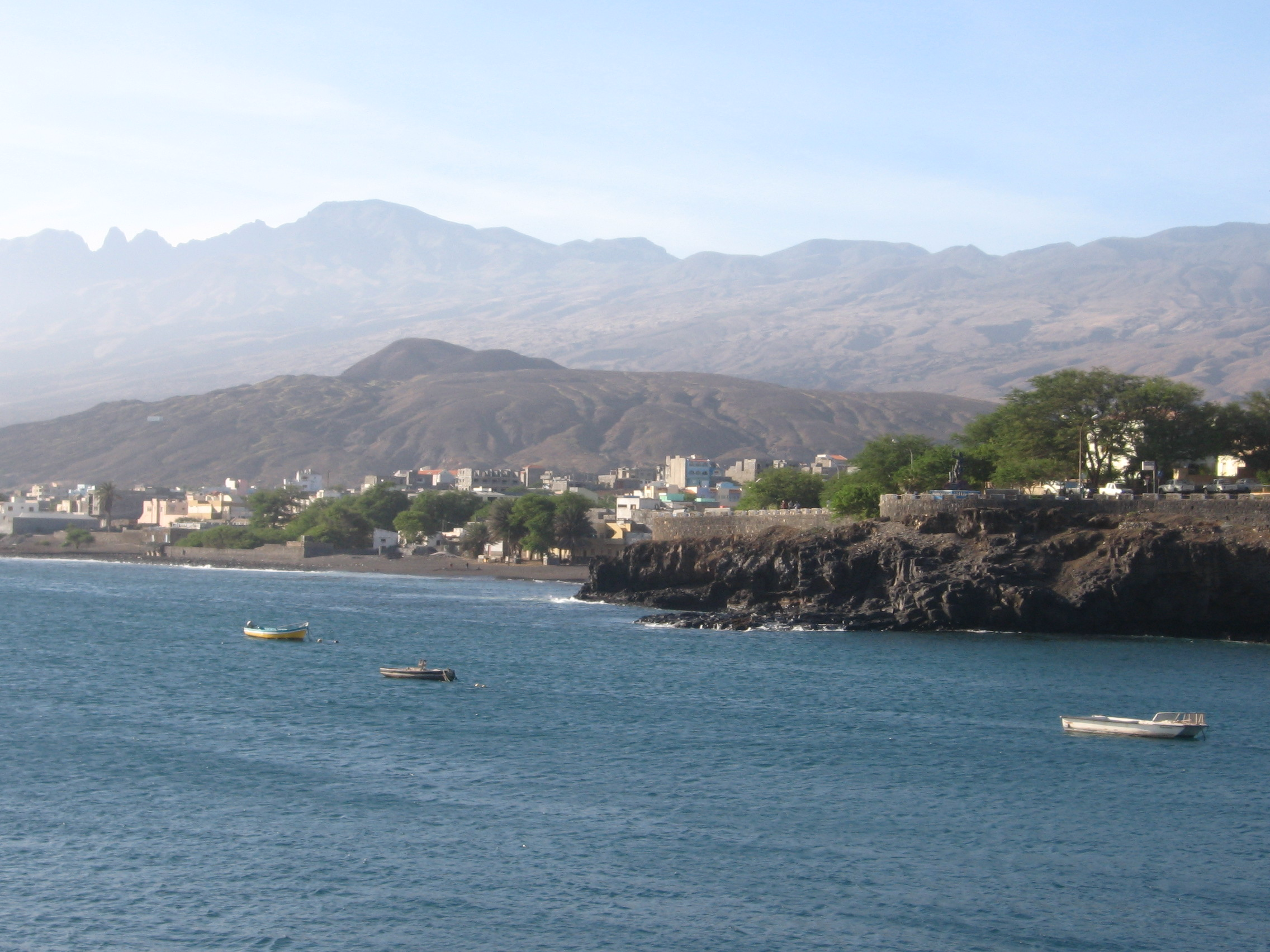 Vista Geral de Porto Novo a partir do cais